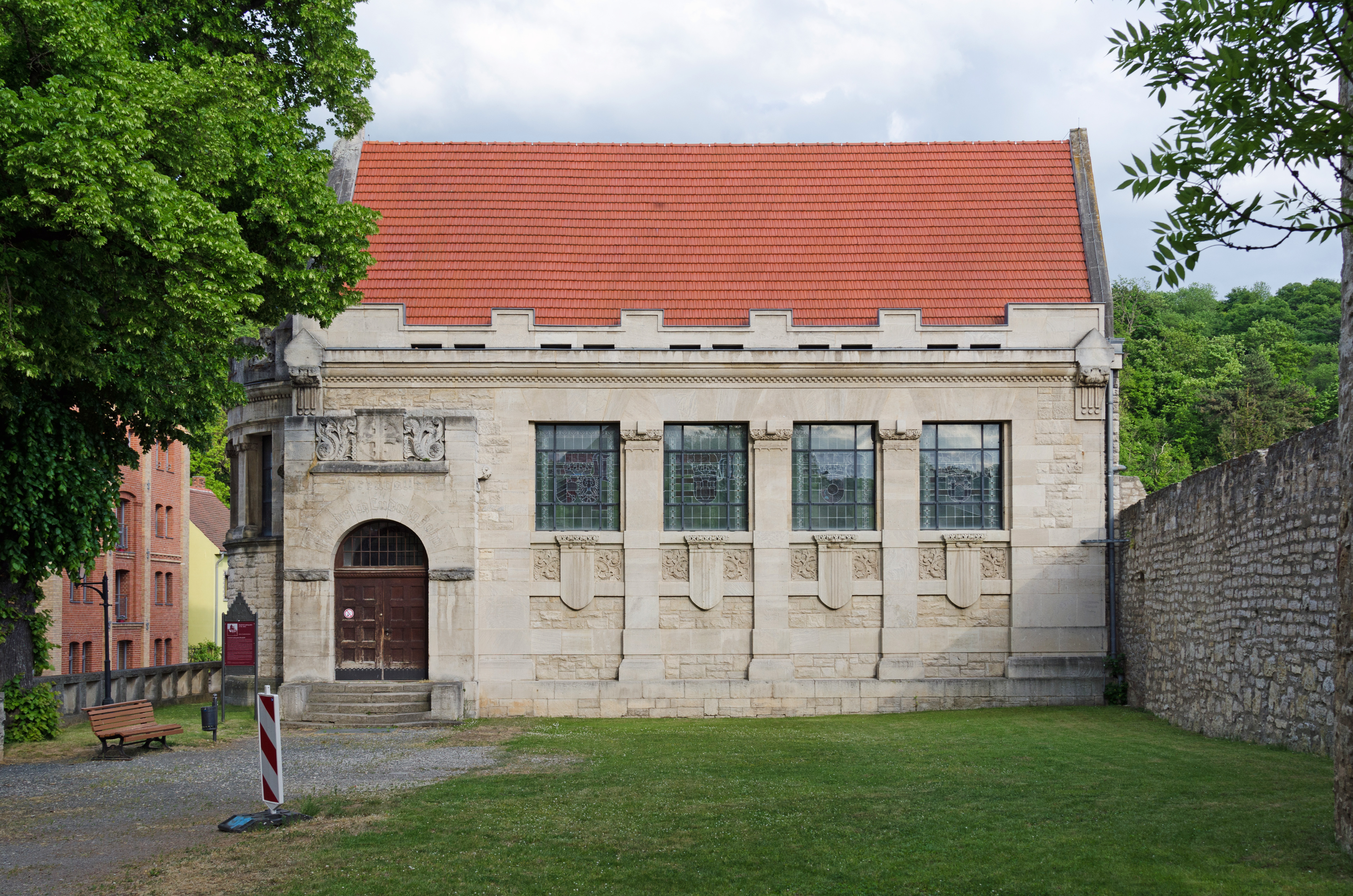 Freyburg an der Unstrut, Schützenstraße 17, Ehrenhalle